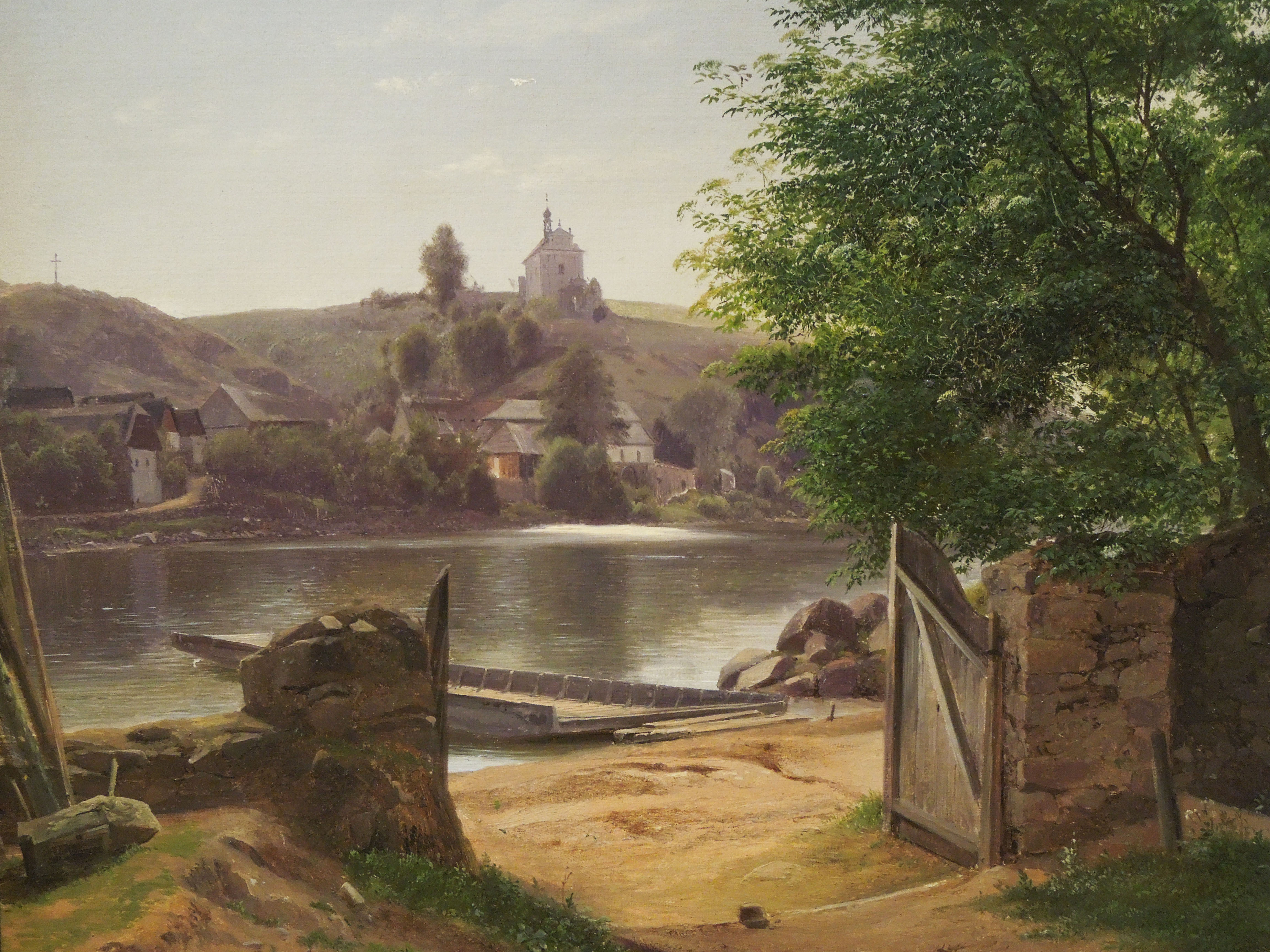 Kamenný Přivoz on the Sázava Riverlabel QS:Lde,"Kamenný Přívoz an der Sázava"label QS:Len,"Kamenný Přivoz on the Sázava River"